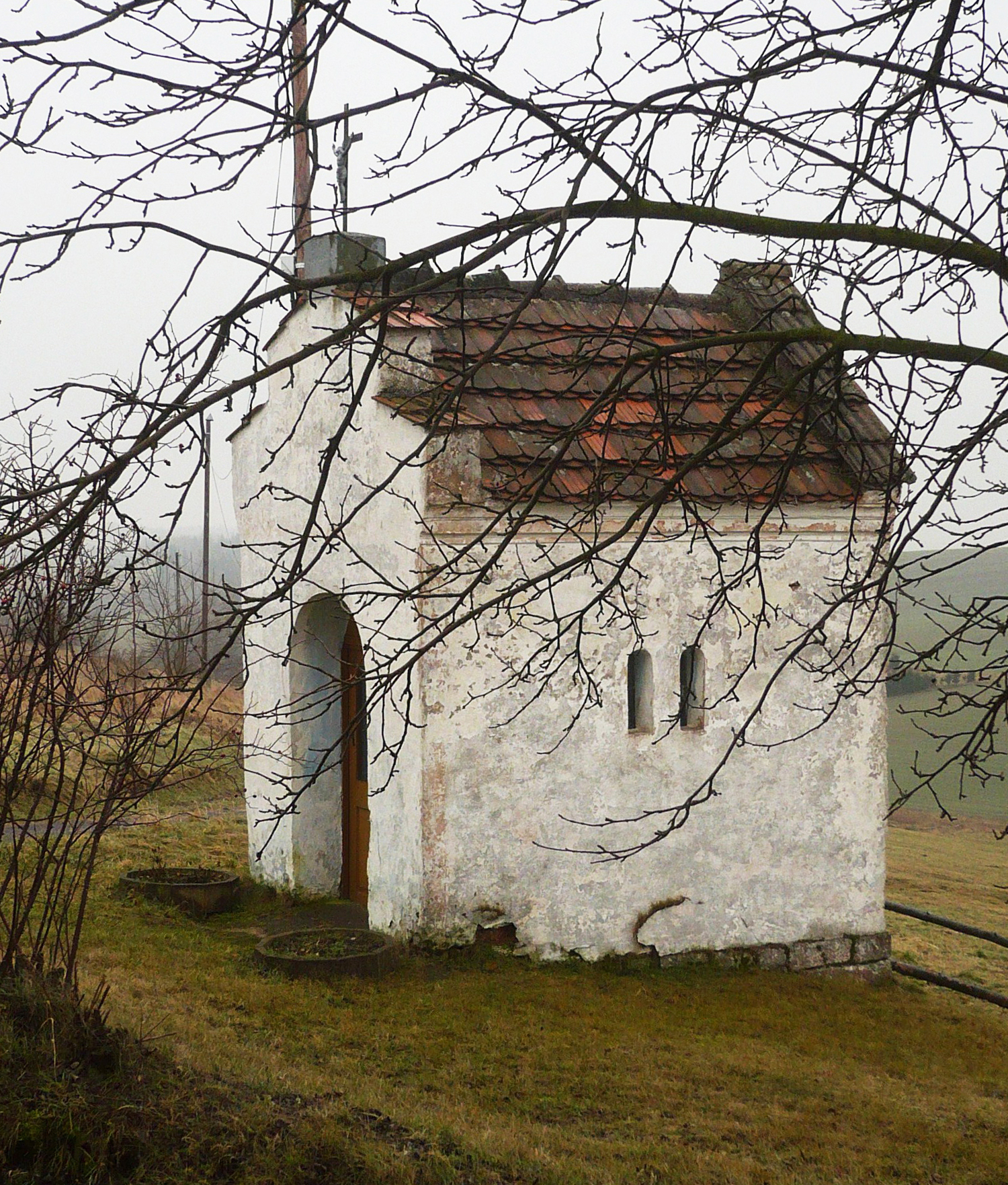 Suszyna. Kaplica